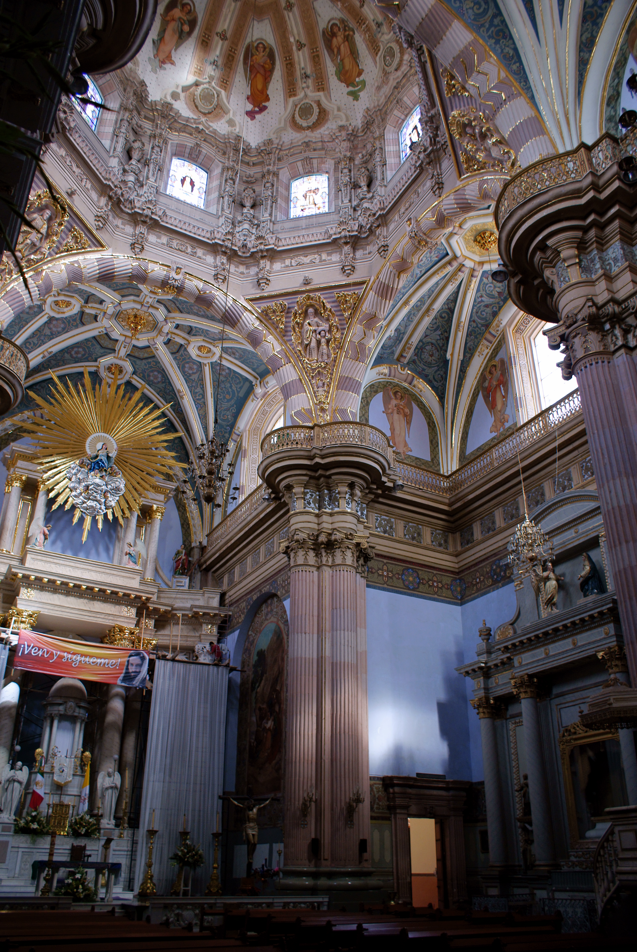 Parroquia de Nuestra Señora de la Asunción, Lagos de Moreno, Jalisco.